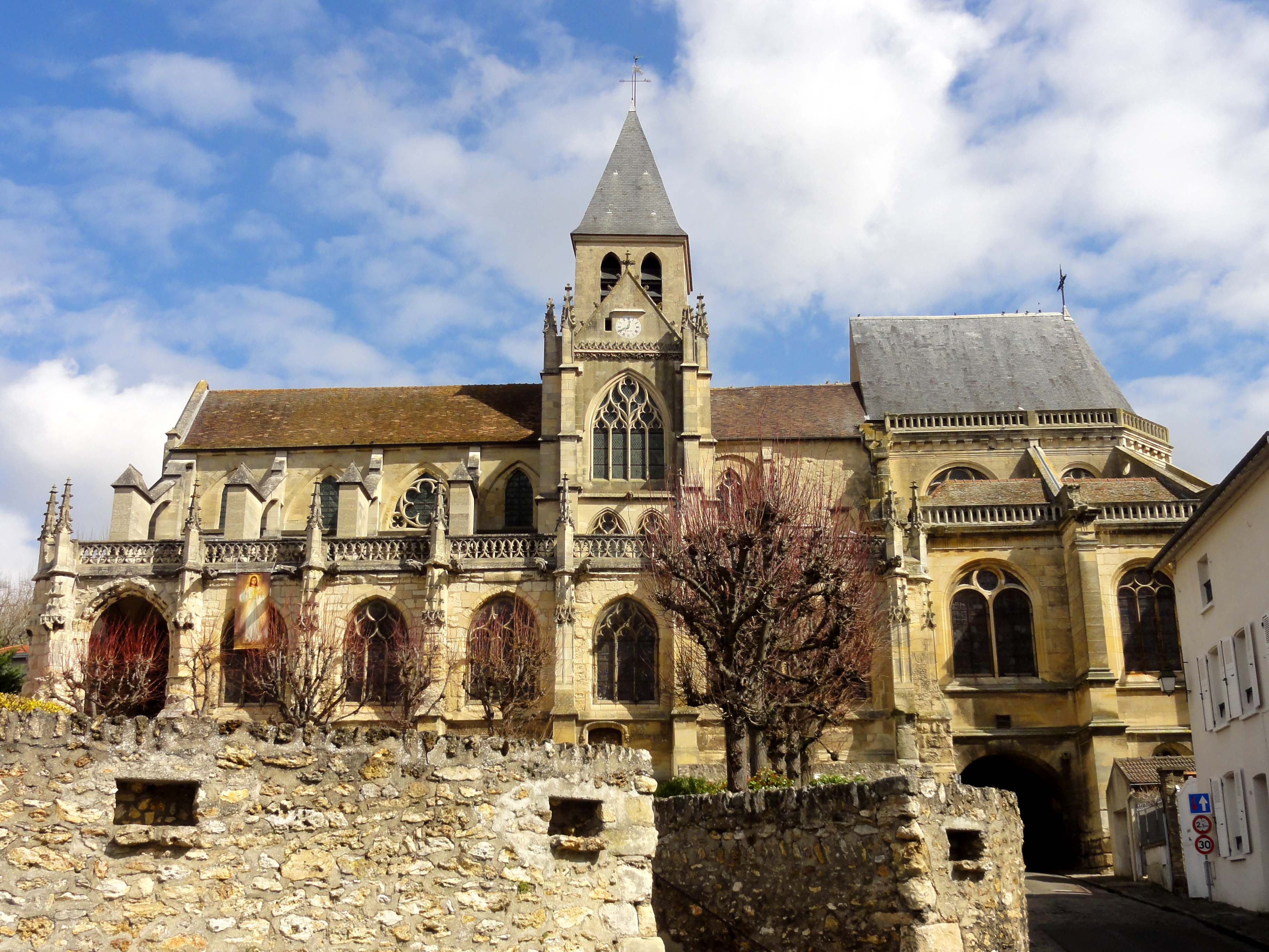 Église Saint-Martin - voir titre.